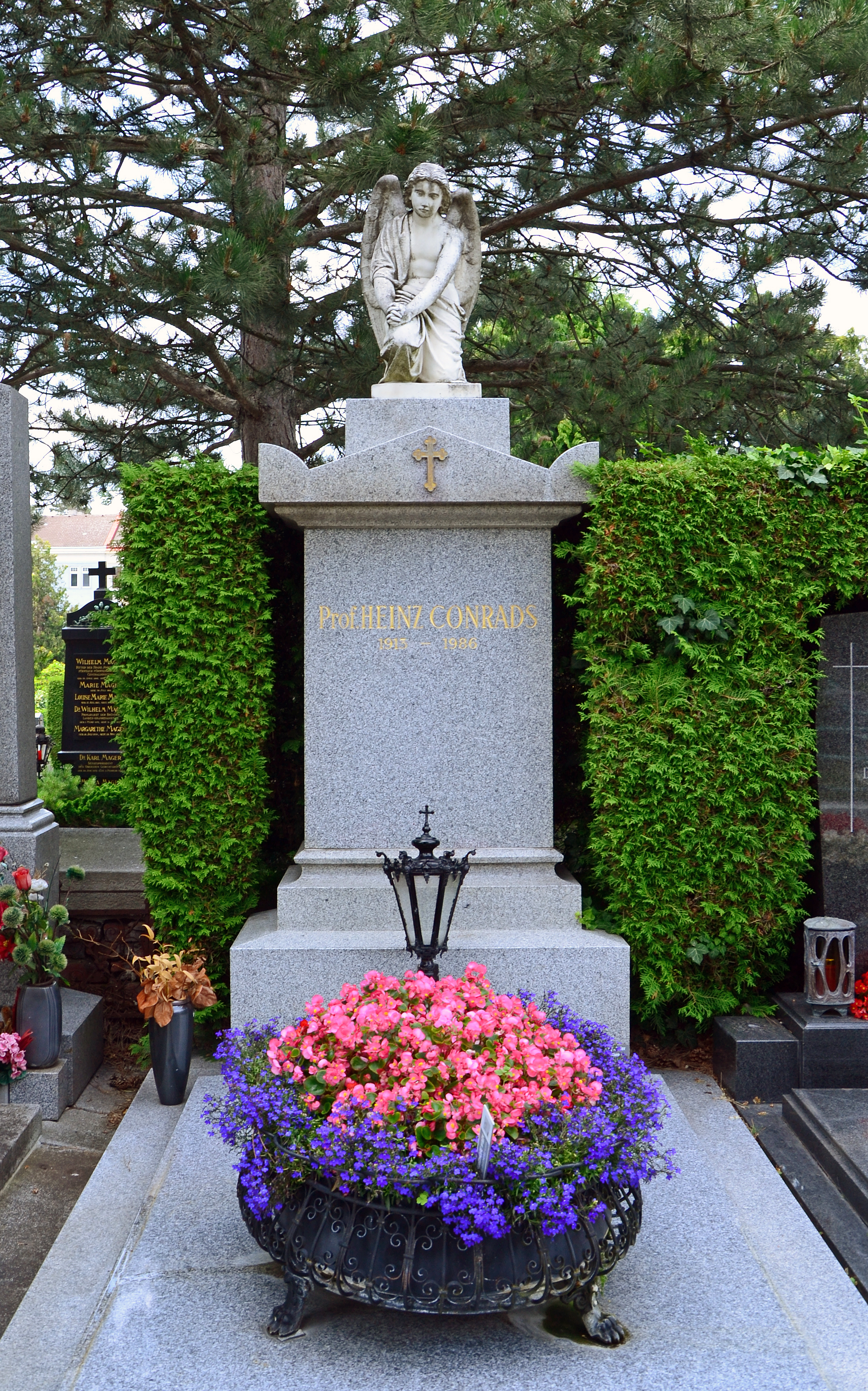 Grab von Heinz Conrads am Hietzinger Friedhof